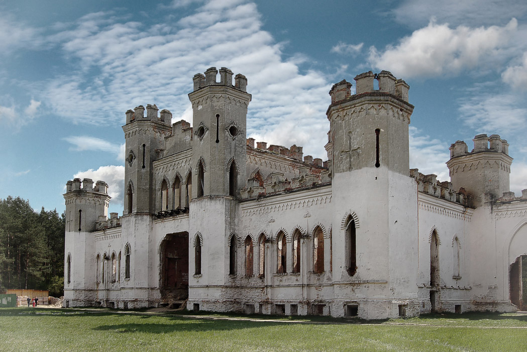 Беларуская (тарашкевіца): Косаўскі палацава-паркавы ансамбль: рэшткі былога палацу Пуслоўскіхмэмарыяльны музэй-сядзіба Т. Касьцюшкіфрагмэнты парку. г. Косава This is a photo of Belarusian heritage monument. Reference number: 111Г000305 ( WLM)